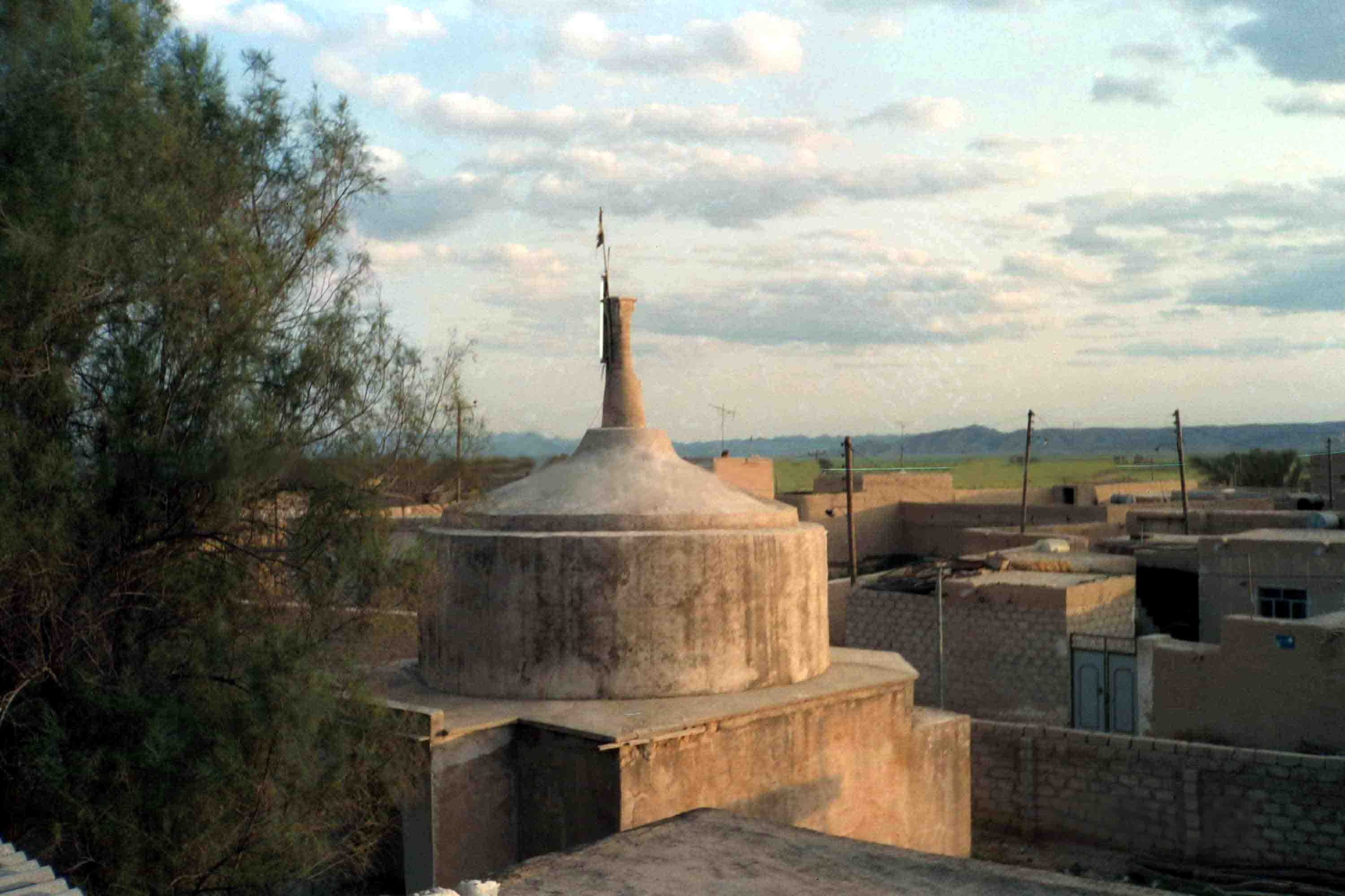 بقعه شيخ اسماعيل جويمي